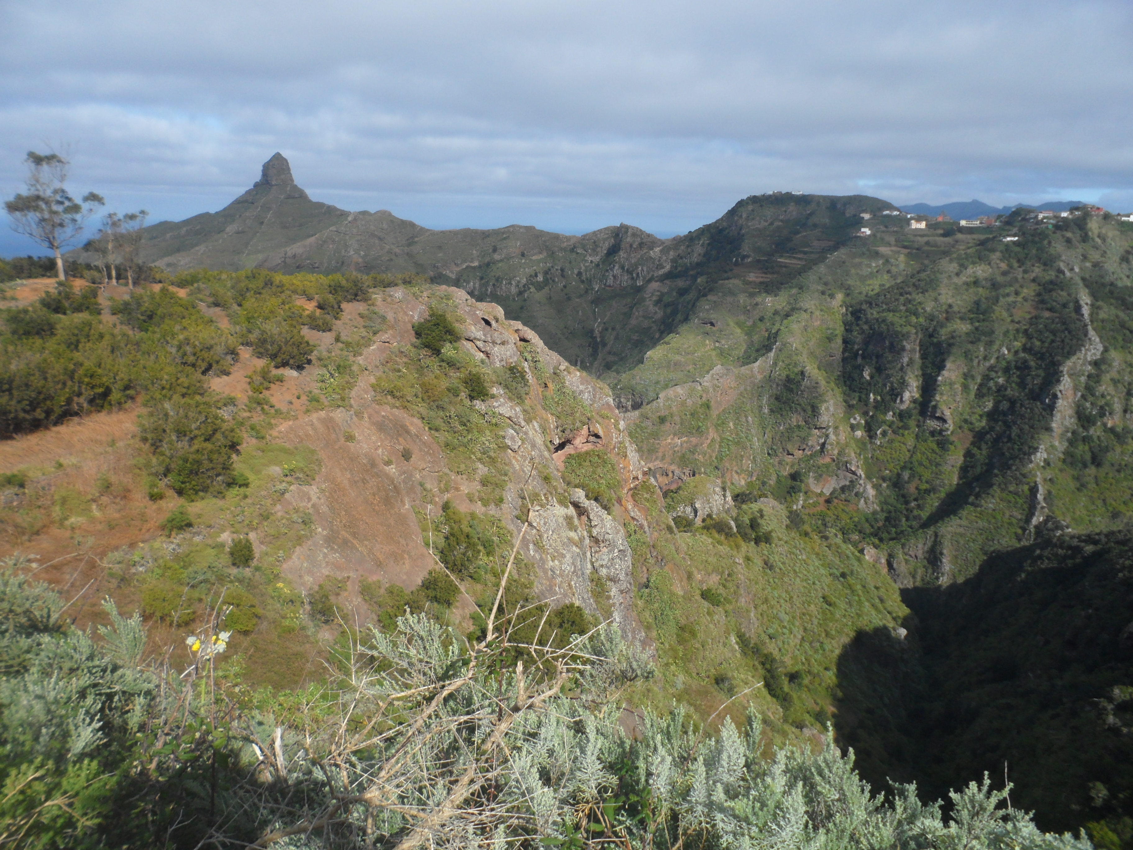 Panorámica del Caserío y Roque de Taborno, visto desde las Carboneras. This is a photography of a Special Area of Conservation in Spain with the ID: ES7020095. Natura2000 entry, EEA entry